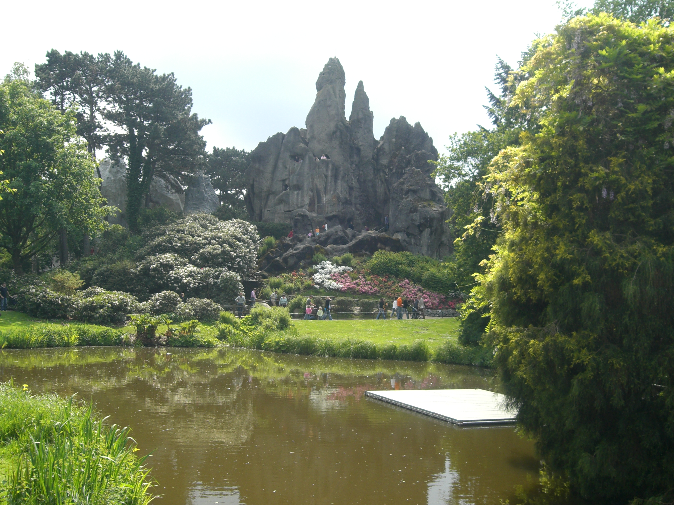 Hagenbecks Tierpark in Hamburg